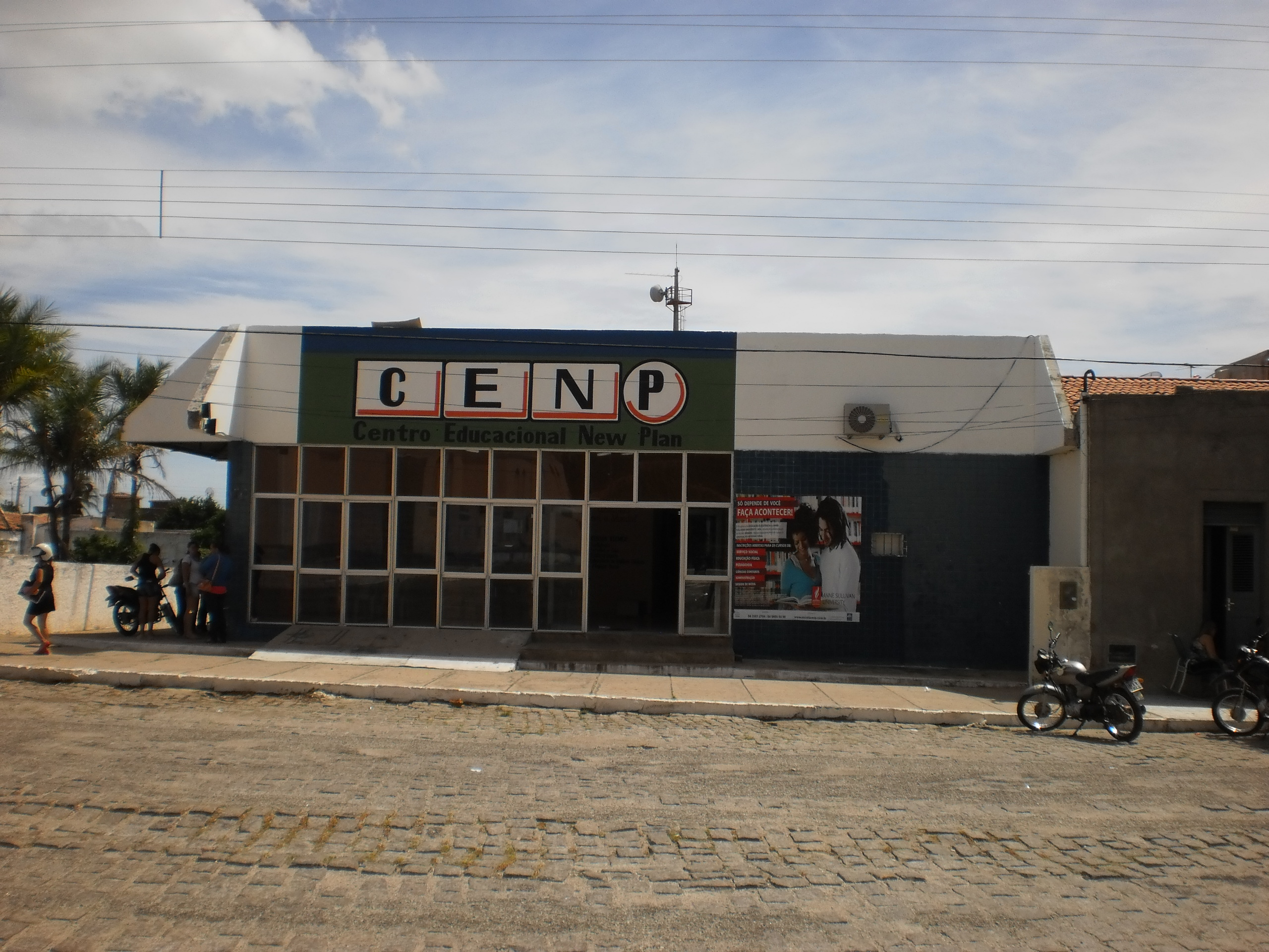 Centro de Estudos Avançados Fênix, em Patu, Rio Grande do Norte, Brasil.